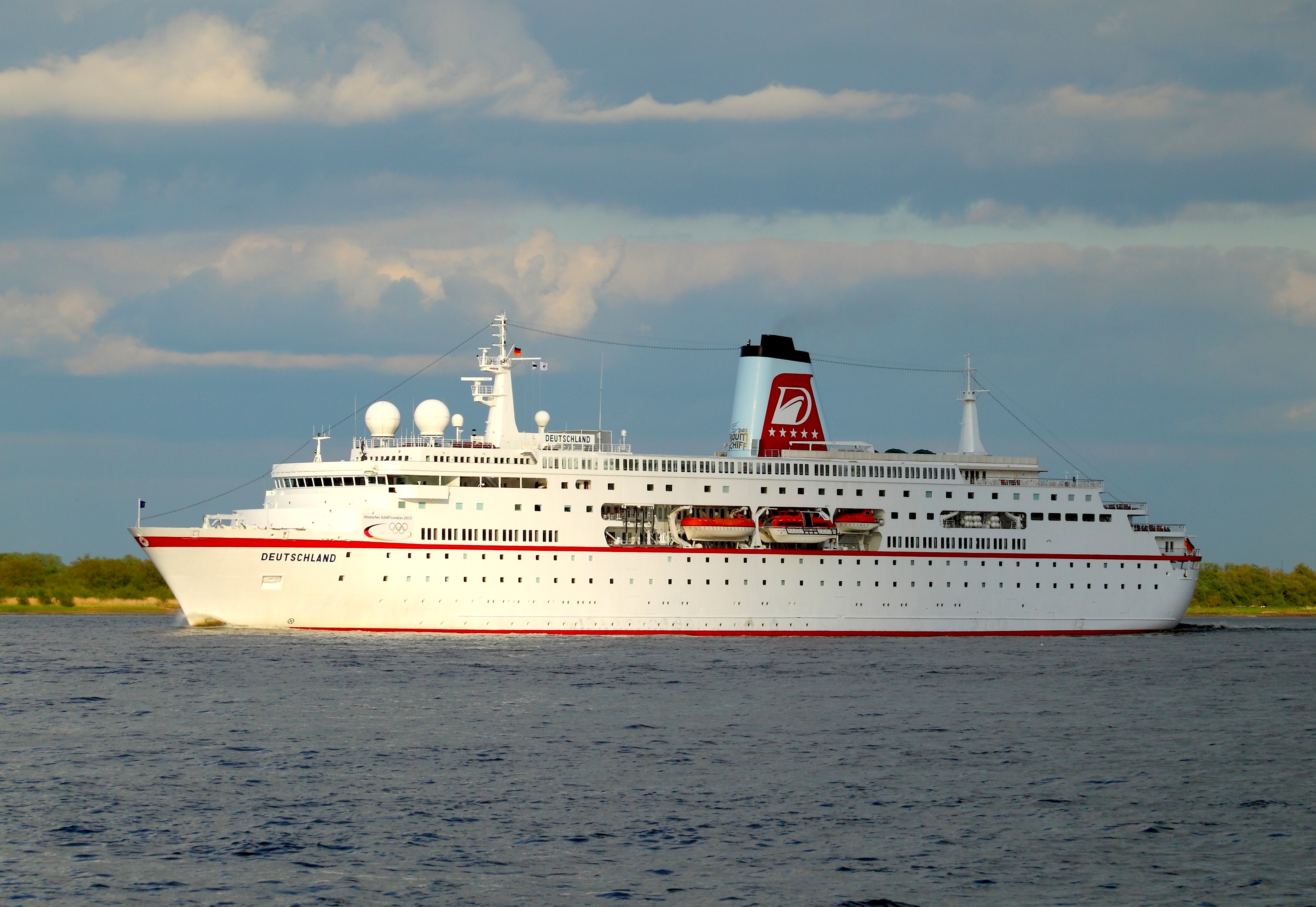 MS Deutschland passing Stadersand, en route from Port of Hamburg to Brunsbüttel